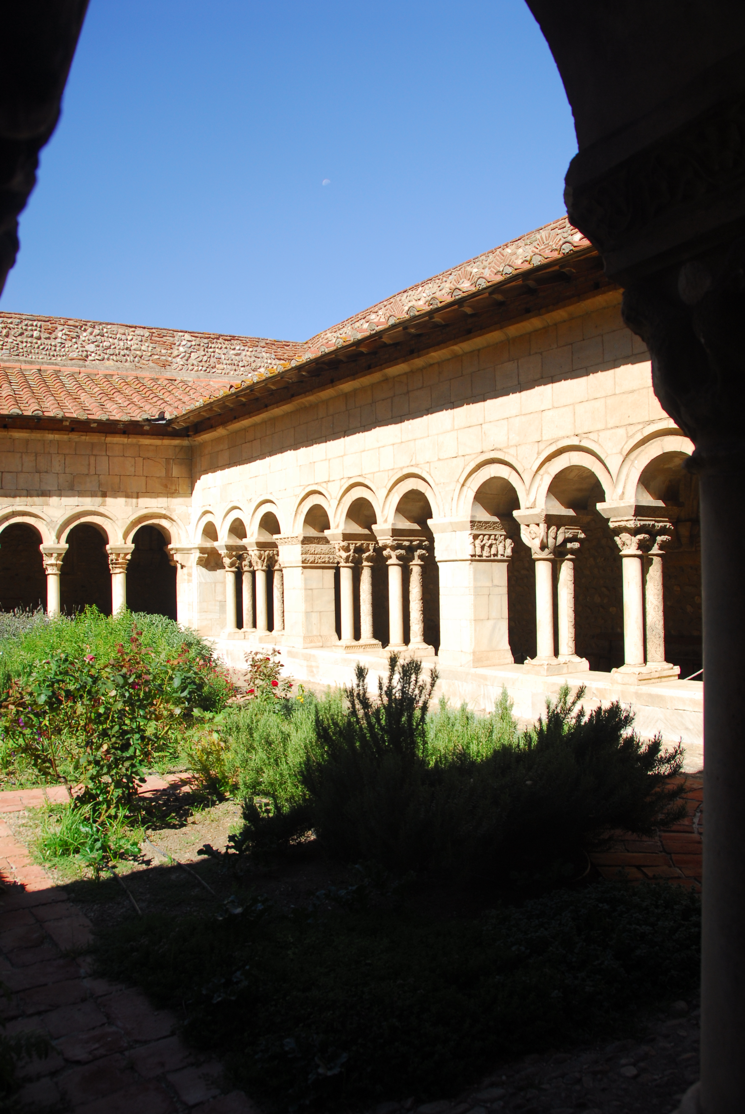 Ste-Eulalie-et-Ste-Julie_d’Elne, Kreuzganghof aus Südgalerie